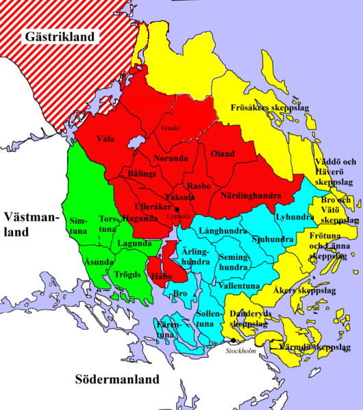 röd = Tiunda cyan = Attunda gul = Roden grön = Fjärdhundra